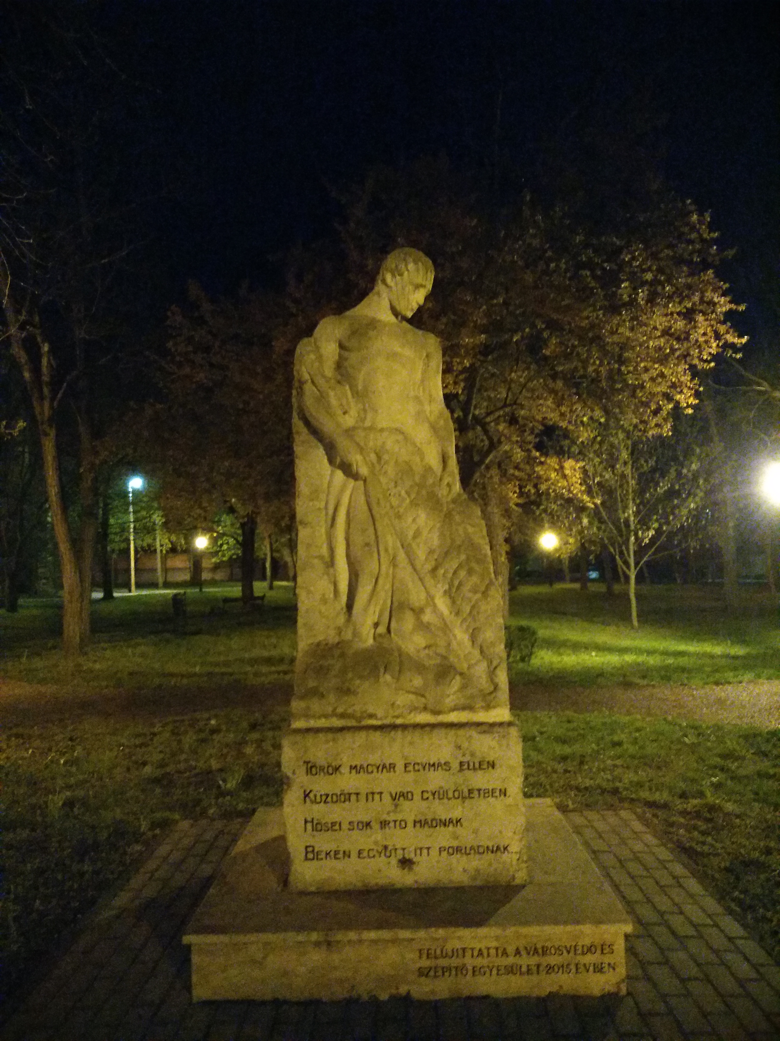 Jászberény, Magyar-török barátság emlékműve, Barátpást